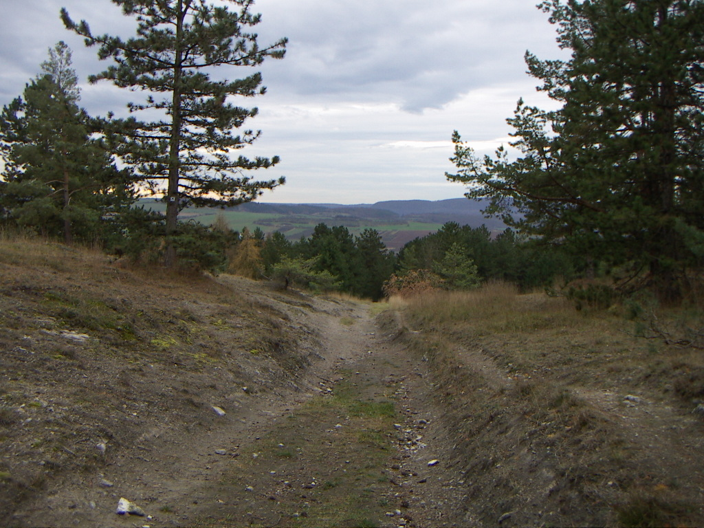 Wanderweg im Kyffhäuser in Richtung Barbarossahöhle im November 2006